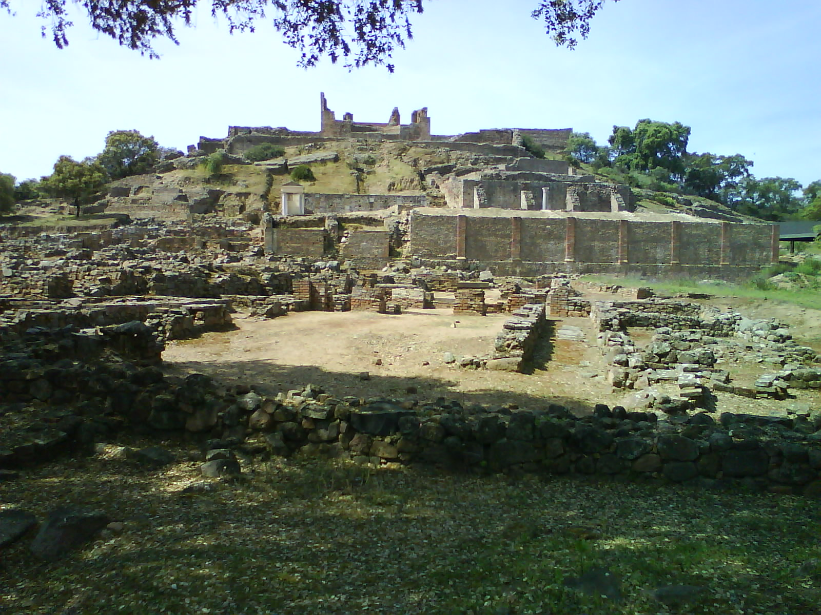 Vista general de las Ruinas de Munigua, se pueden observar los diferentes niveles de terrazas.